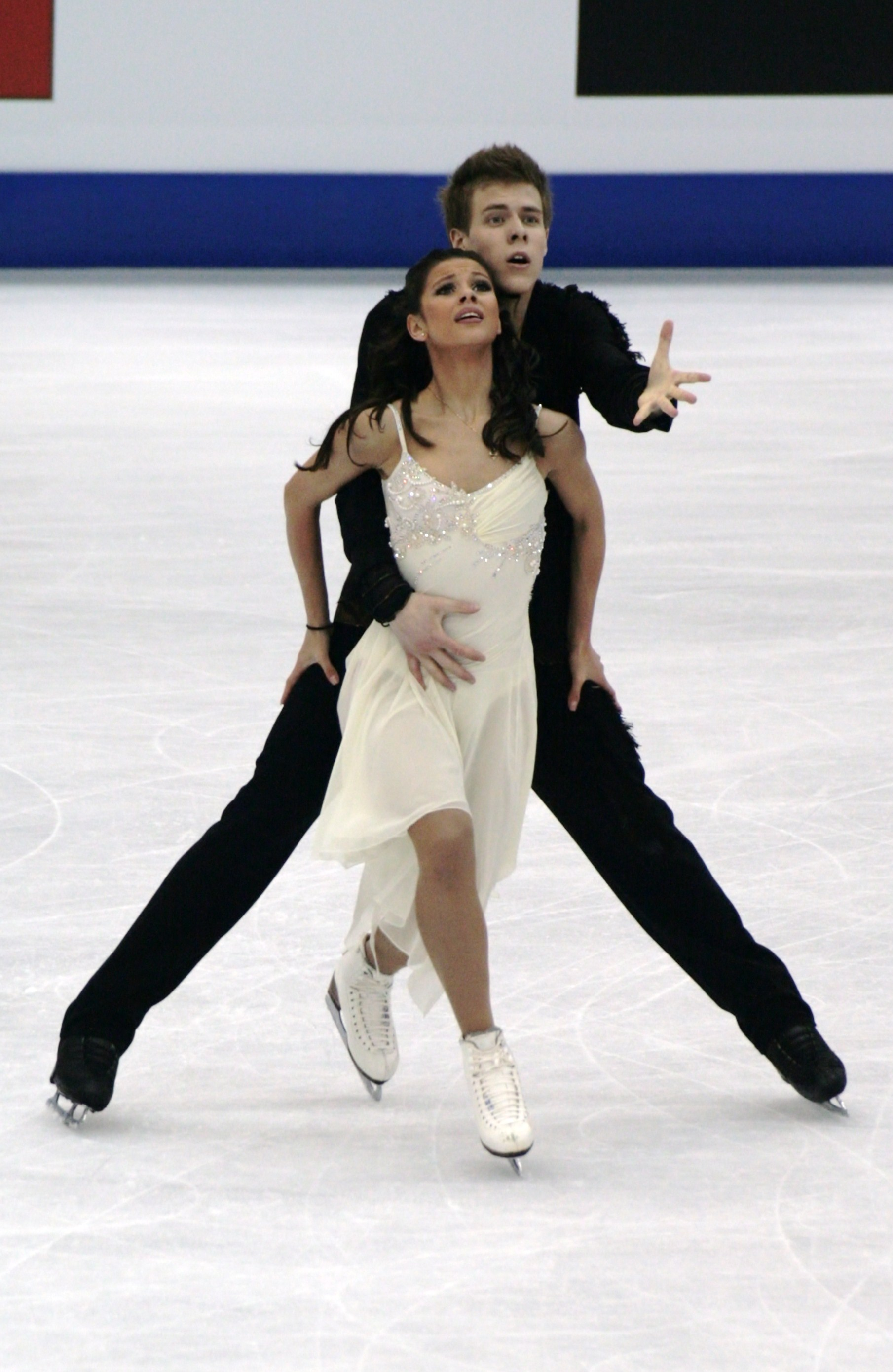 Елена Ильиных и Никита Кацалапов (Россия) на чемпионате мира по фигурному катанию 2012